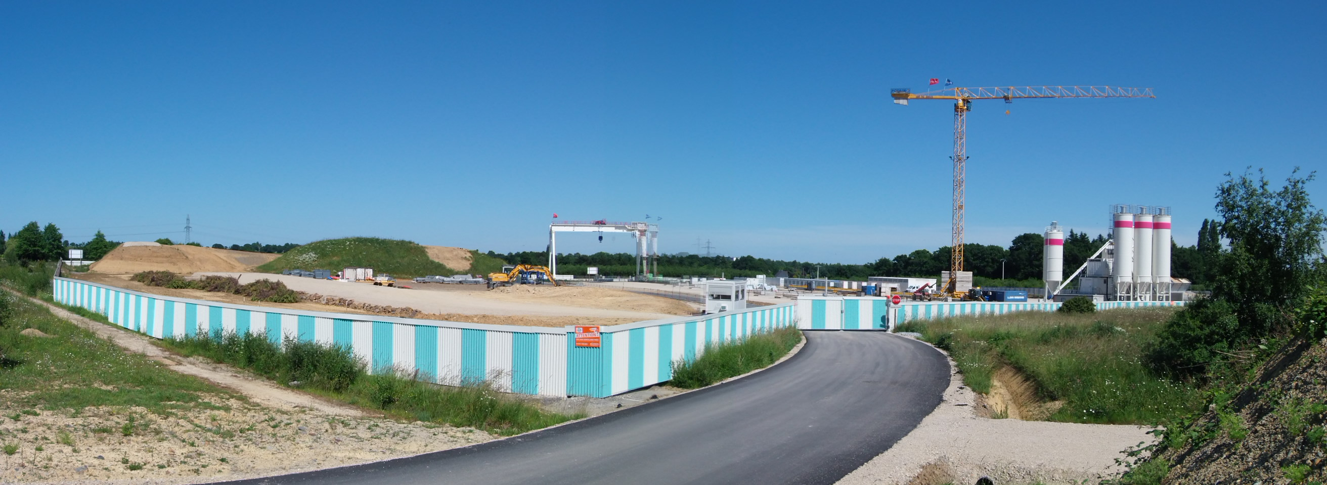 Vue panoramique du chantier du métro ligne B de Rennes à la future station Cesson Viasilva.